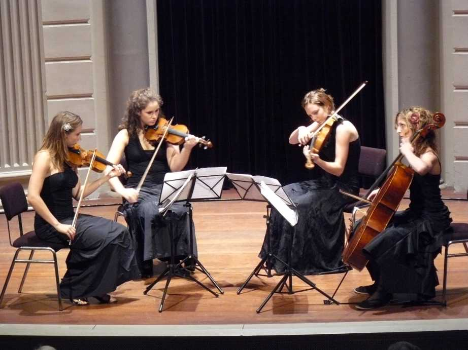 Allegrakwartet in het Concertgebouw, Amsterdam